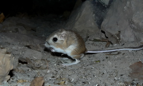 Кенгуровый прыгун Мерриама ( Dipodomys merriami), Познаньский зоопарк (Poznan zoo), 07 ноября 2011 года